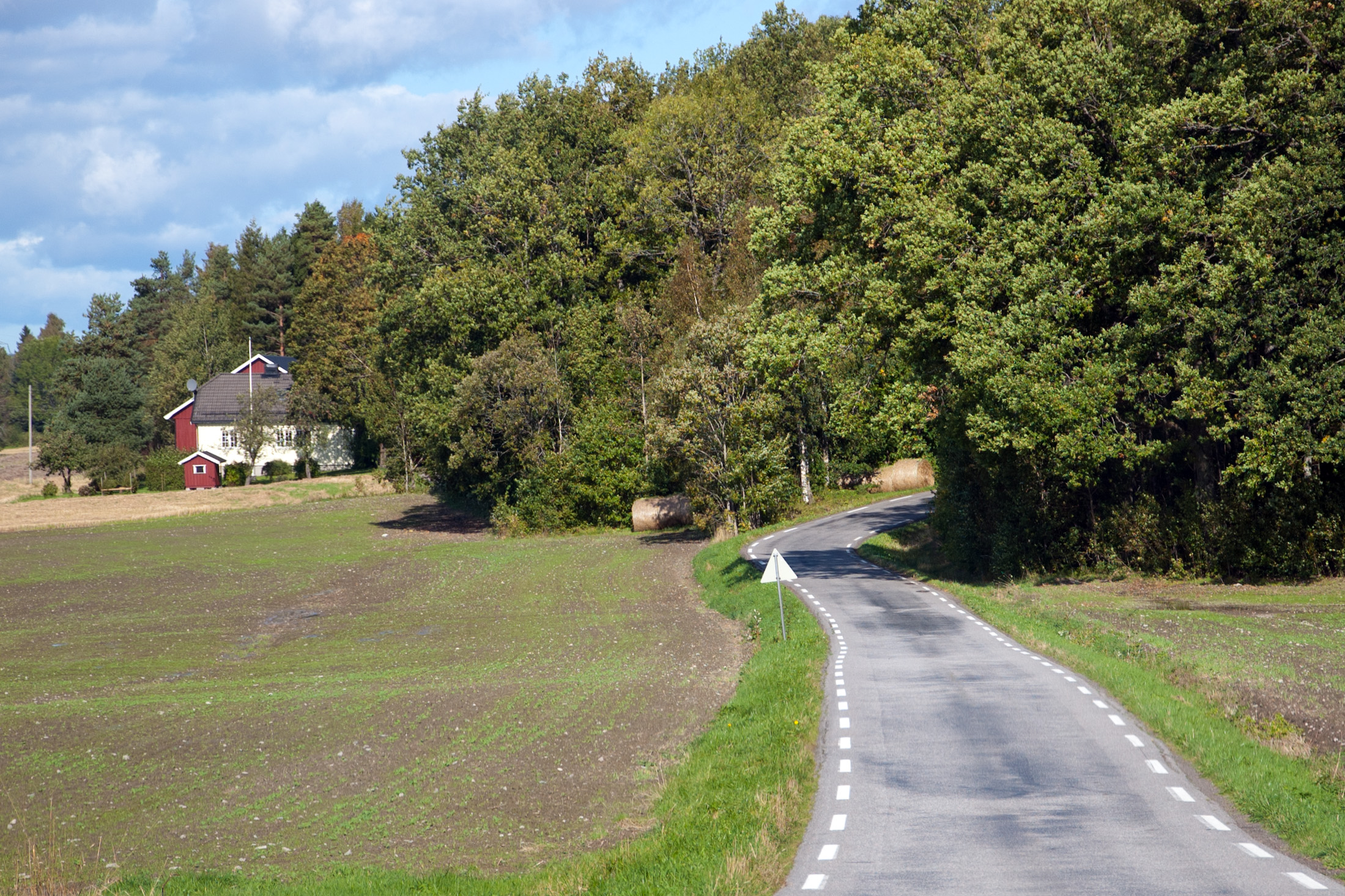 Fylkesvei 755 Sørbyveien ved Kåpe i Re, Vestfold